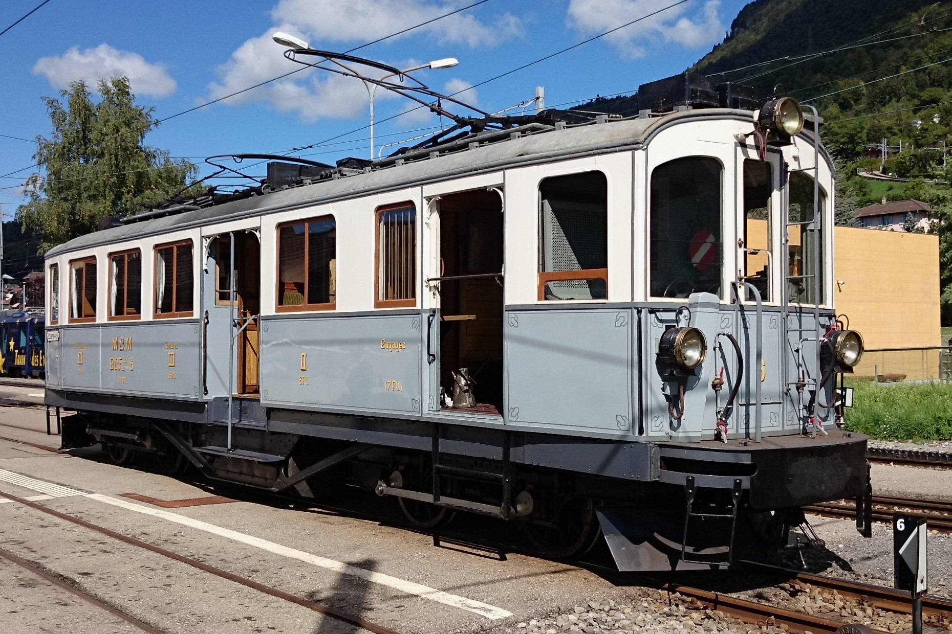 Historischer meterspur Motorwagen BCFeh 4/4 6 mit gemischtem Adhäsions- und Zahnradantrieb der ehemaligen Monthey–Champéry–Morgins-Bahn (MCM), heute Transports Publics du Chablais (TPC), bei der Museumsbahn Blonay–Chamby im Bahnhof Blonay.